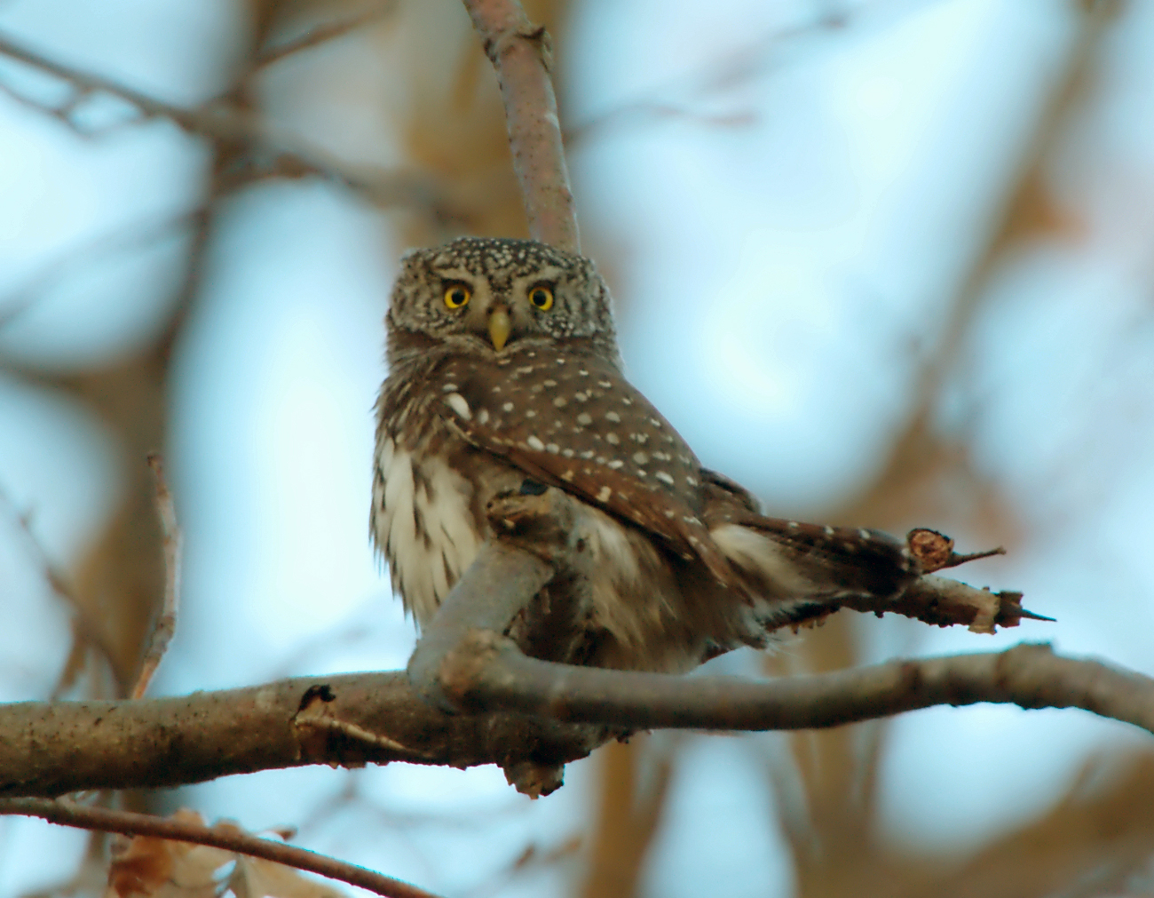 Glaucidium passerinum, Göteborg, Sweden